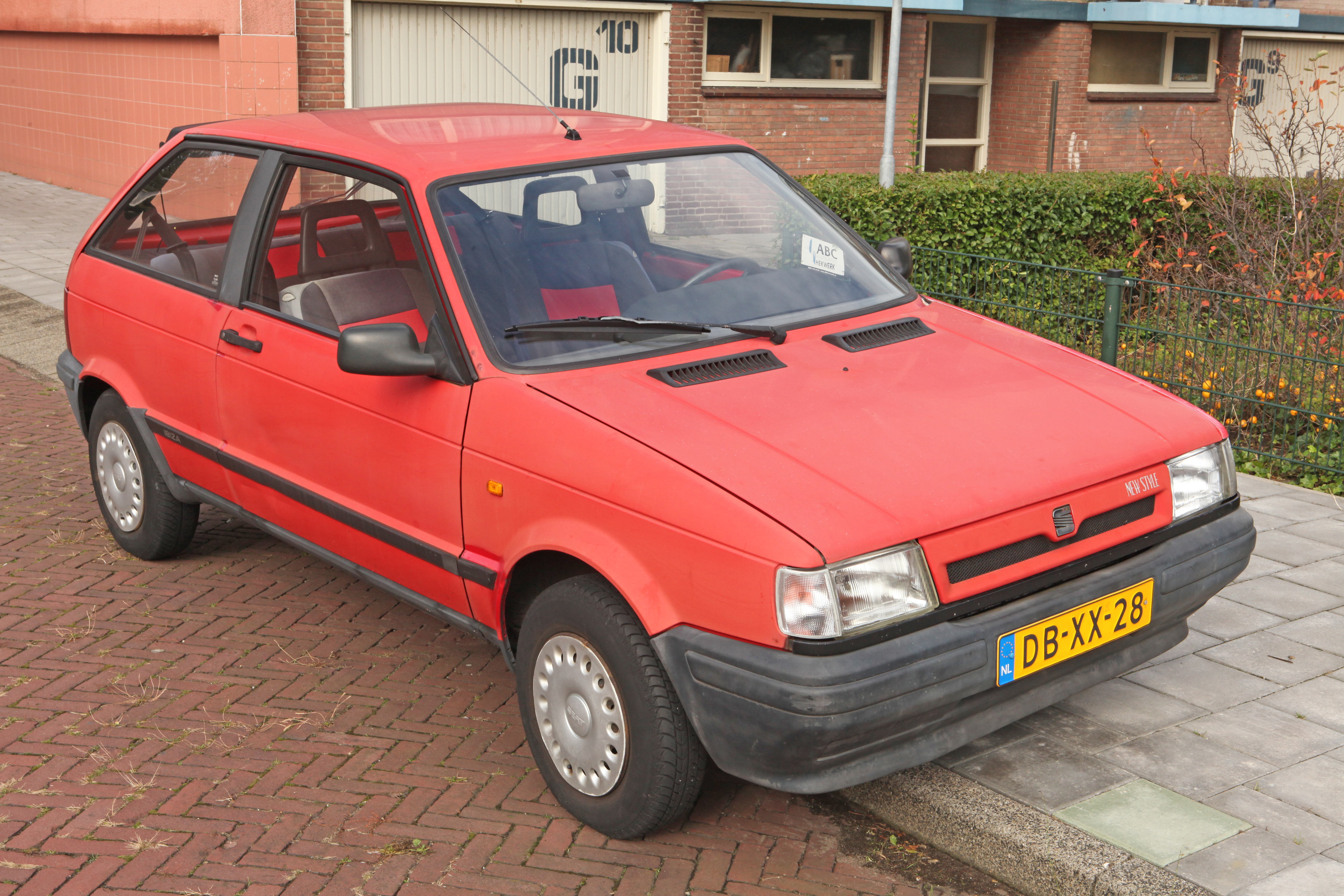 1991 Seat Ibiza 1.2 I